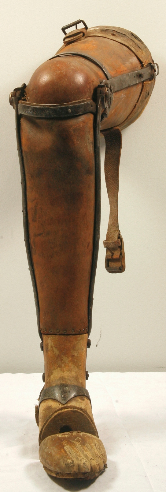 Na kmetiji v Galiciji pri Žalcu so živeli trije bratje in so bili vsi trije policani v boj. Veber Jakob (roj. 20. 01. 1888 - 15. 03. 1949) je odšel na boj na Vzhodno fronto (Ruska). Na bojišču je leta1917 izgubil desno nogo pri kolenu, tam so mu izdelali ti dve protezi. Na fronti je ostal do konca vojne. Protezi sta zelo lepo ohranjeni - les, usnje, železne zakovice za prepogib. V boju je izgubil tudi starejšega brata Janeza, ki je zapustil ženo Marijo Veber (roj. Cvikl, 12. 11. 1888 - 25. 02. 1936) in tri otroke (Franca, roj. 22. 11. 1911, Angelo, roj. 20. 03. 1912 in Jožefo, roj. 1914 ). Po prihodu na domačijo je prevzel zanje tudi skrb, z Marijo sta se poročila in razširila družino še za dva člana, fanta Vincenca in Adolfa (kasneje sta bila oba vpoklicana v 2. sv. vojno in sta jo preživela).